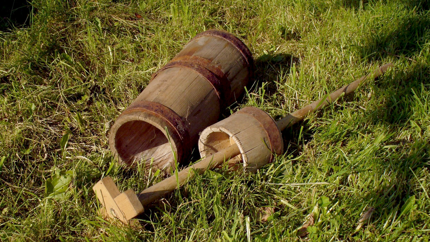 Бойка (маслобойка). Бондарное изделие для сбивания сливочного масла. Беларусь. Витебская область. Городокский район.